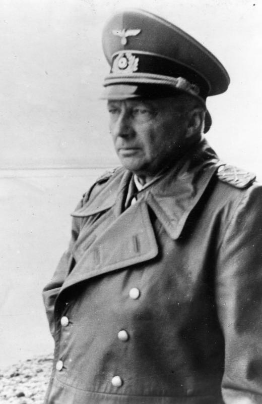 Generalfeldmarschall von Kluge im Westen Der neuernannte Oberbefehlshaber West, Generalfeldmarschall von Kluge, befand sich in den letzten Tagen auf einer Besichtigungsfahrt an der Kanalküste. Er besuchte die dort eingesetzten Divisionen und informierte sich über den Stand der Verteidigungs- und Abwehrmaßnahmen im Falle einer erneuten Landung des Feindes. Unser Bild zeigt den Generalfeldmarschall auf einem Besichtigungsgang